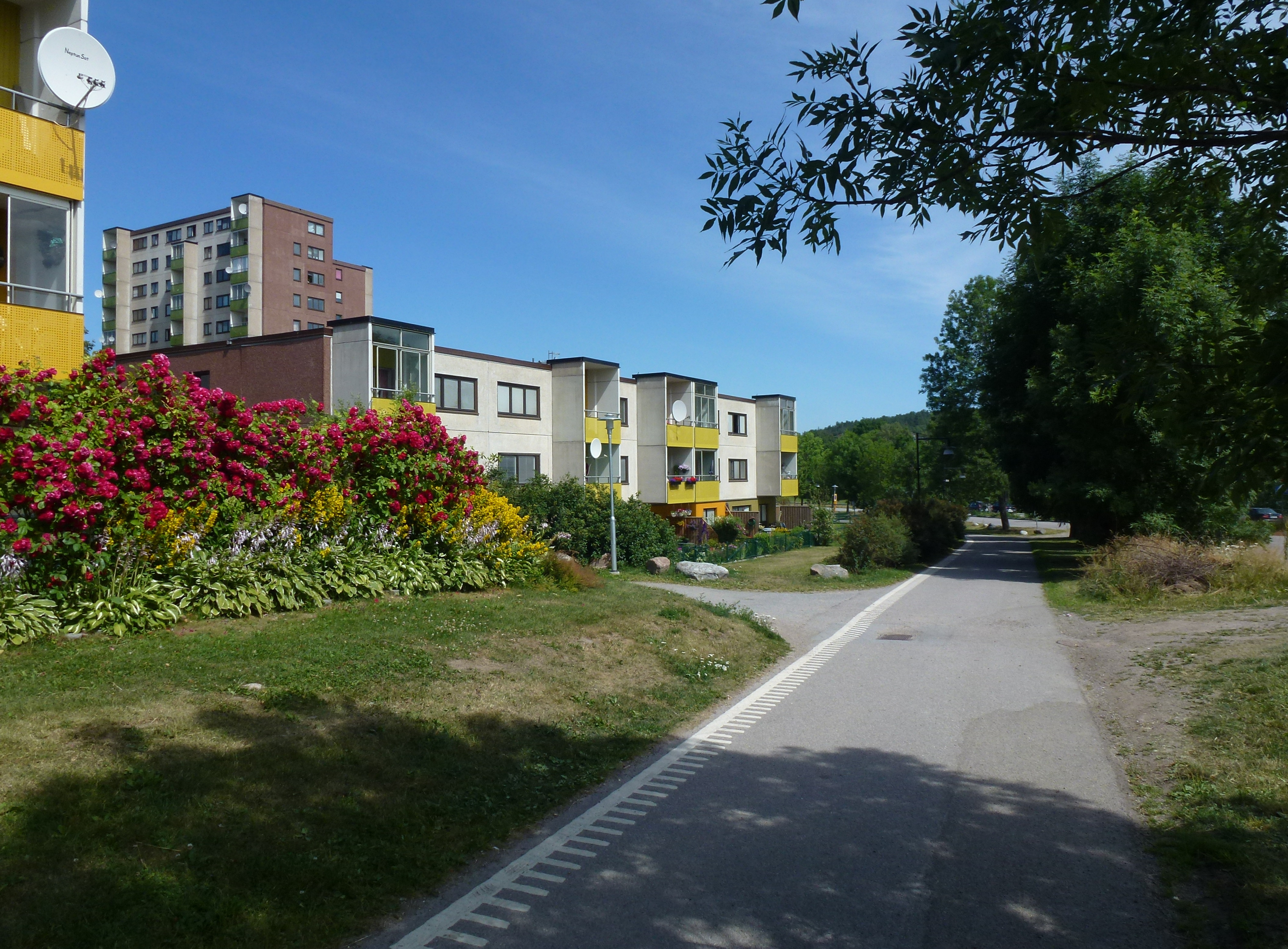 Fittja gårds gamla allé och 1970-tals bebyggelse vid Värdshusvägen